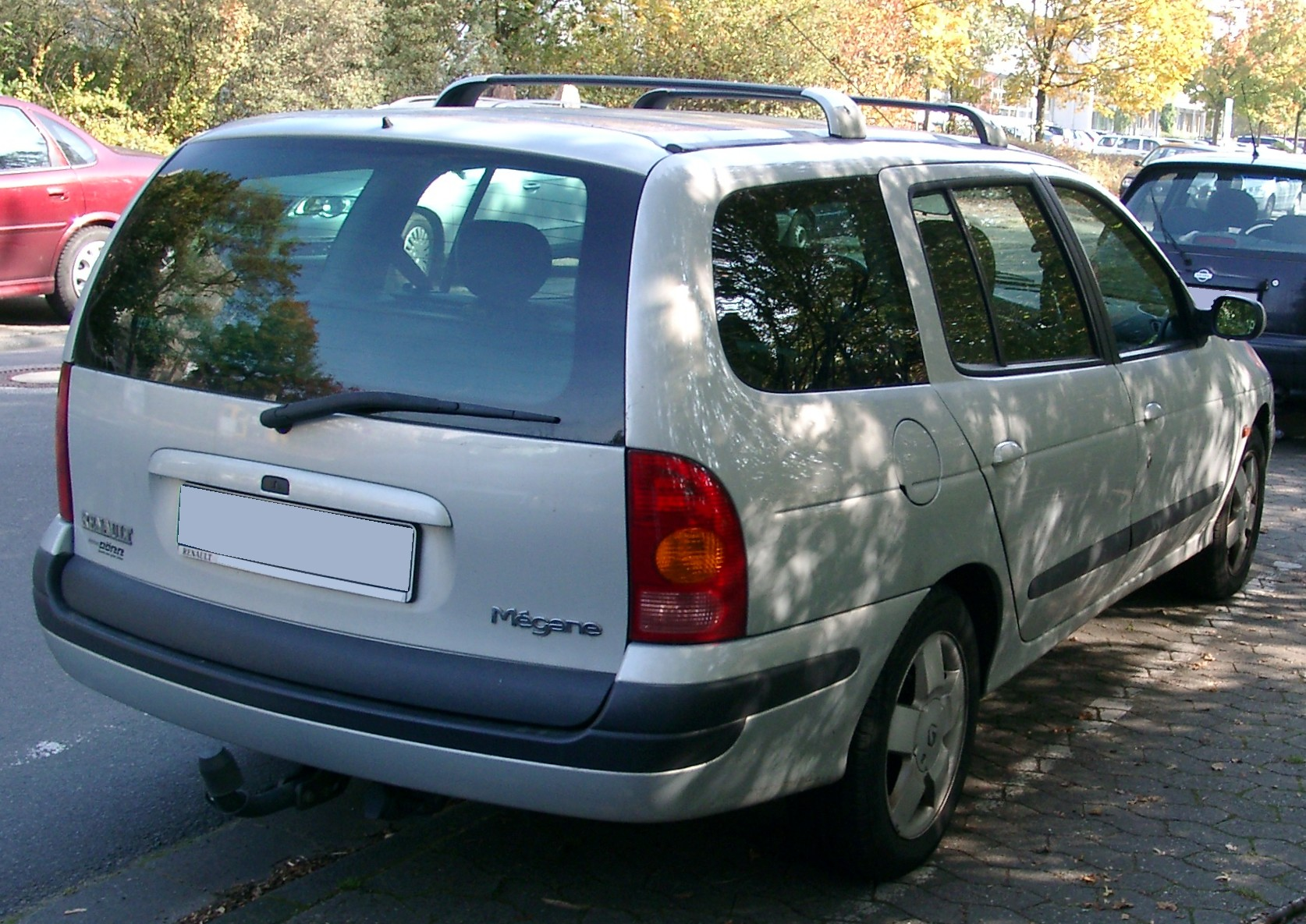 Renault Mégane Kombi